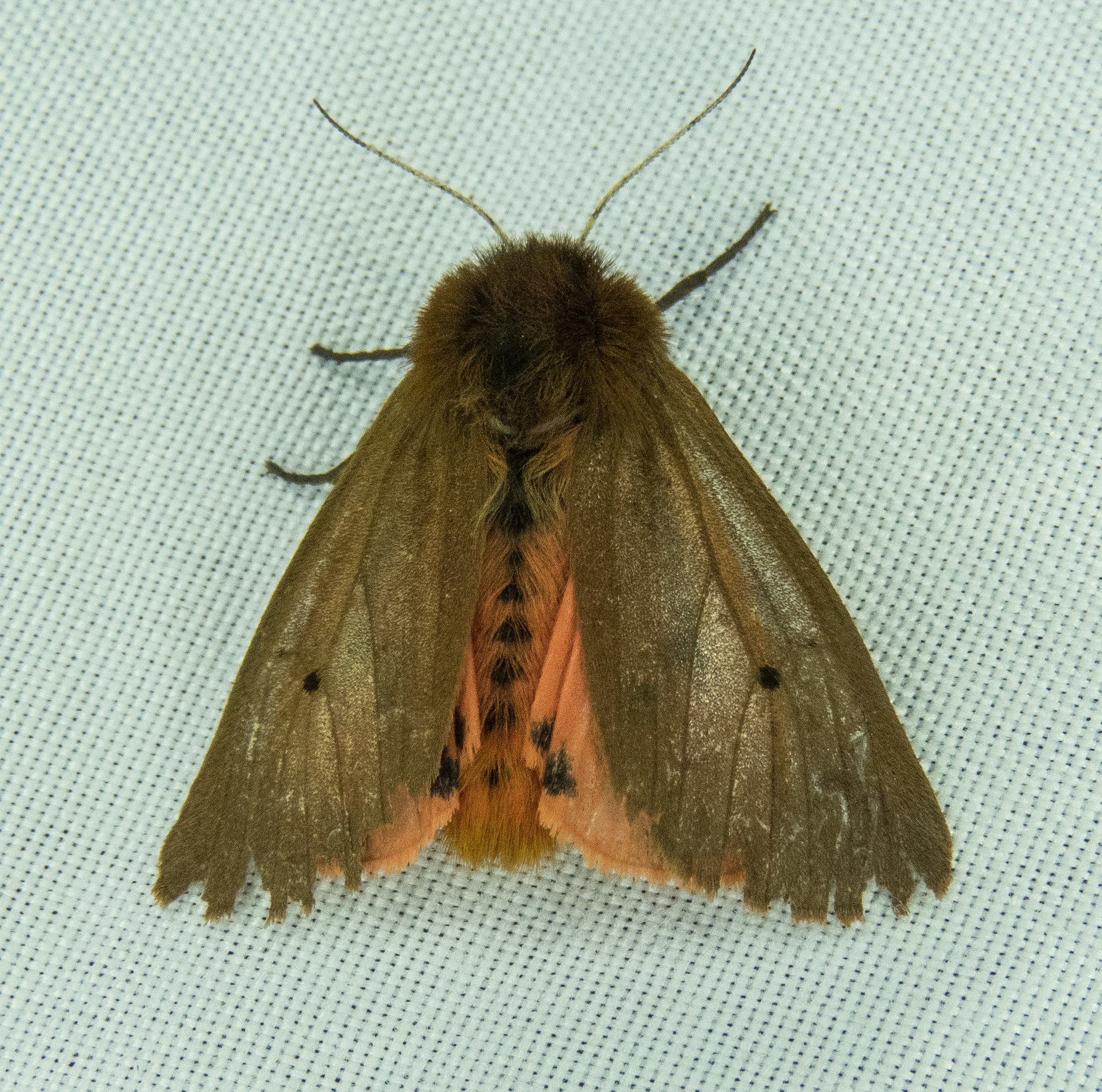 Phragmatobia fuliginosa